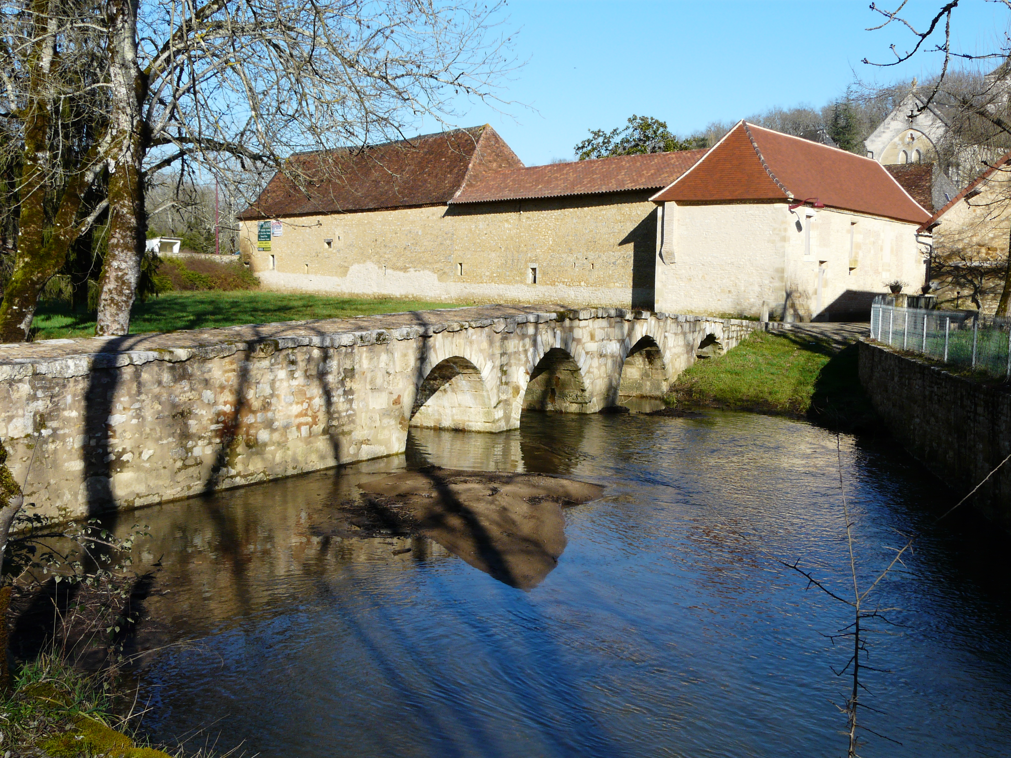 Le petit pont sur le Ravillou, Saint-Germain-des-Prés, Dordogne, France.